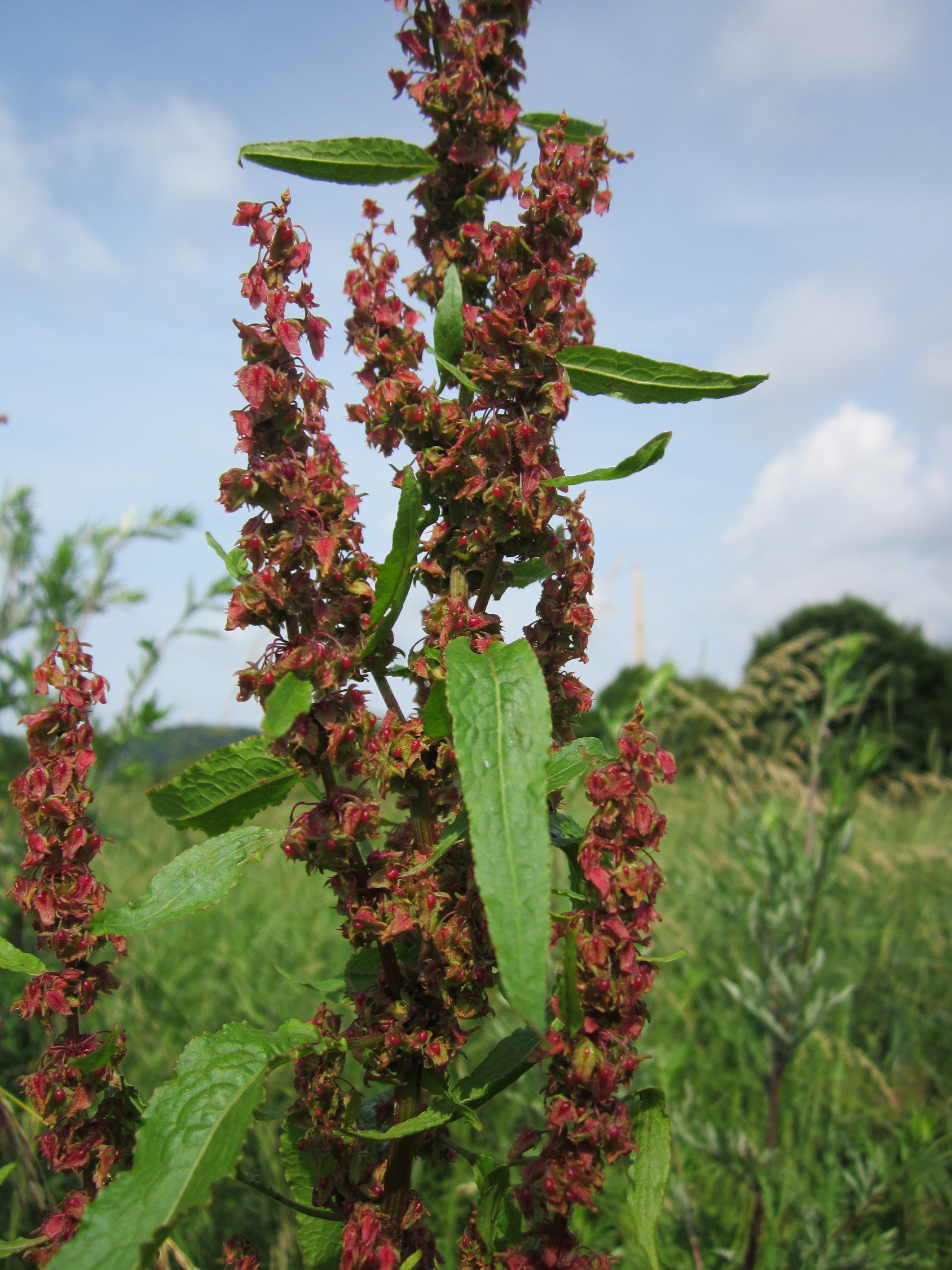 Stumpfblättriger Ampfer (Rumex obtusifolius) im Naturschutzgebiet "St. Arnualer Wiesen"